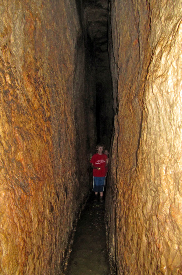 Hezekiah's Tunnel נקבת השילוח